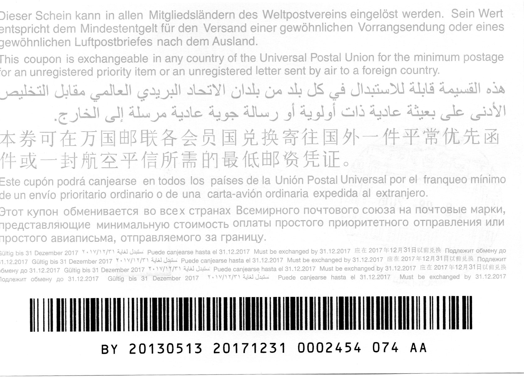 Міжнародны адказны купон з Беларусі, 2016 г.